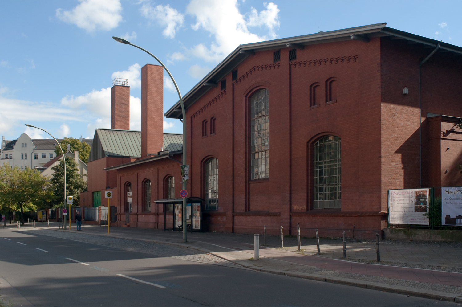 Ehemaliges Pumpwerk des Radialsystems VIII des Berliner Abwassersystems,erbaut 1887-1889. Das alte Pumpwerk wird heute als Veranstaltungsort genutzt. Im Hintergrund ist die moderne Pumpstation von 1987 (Entwurf: Oswald Mathias Ungers und Stefan Schroth) zu sehen.